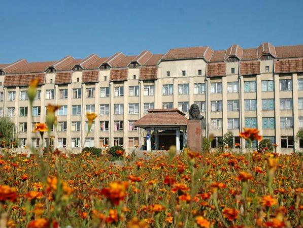 Калуська політехніка